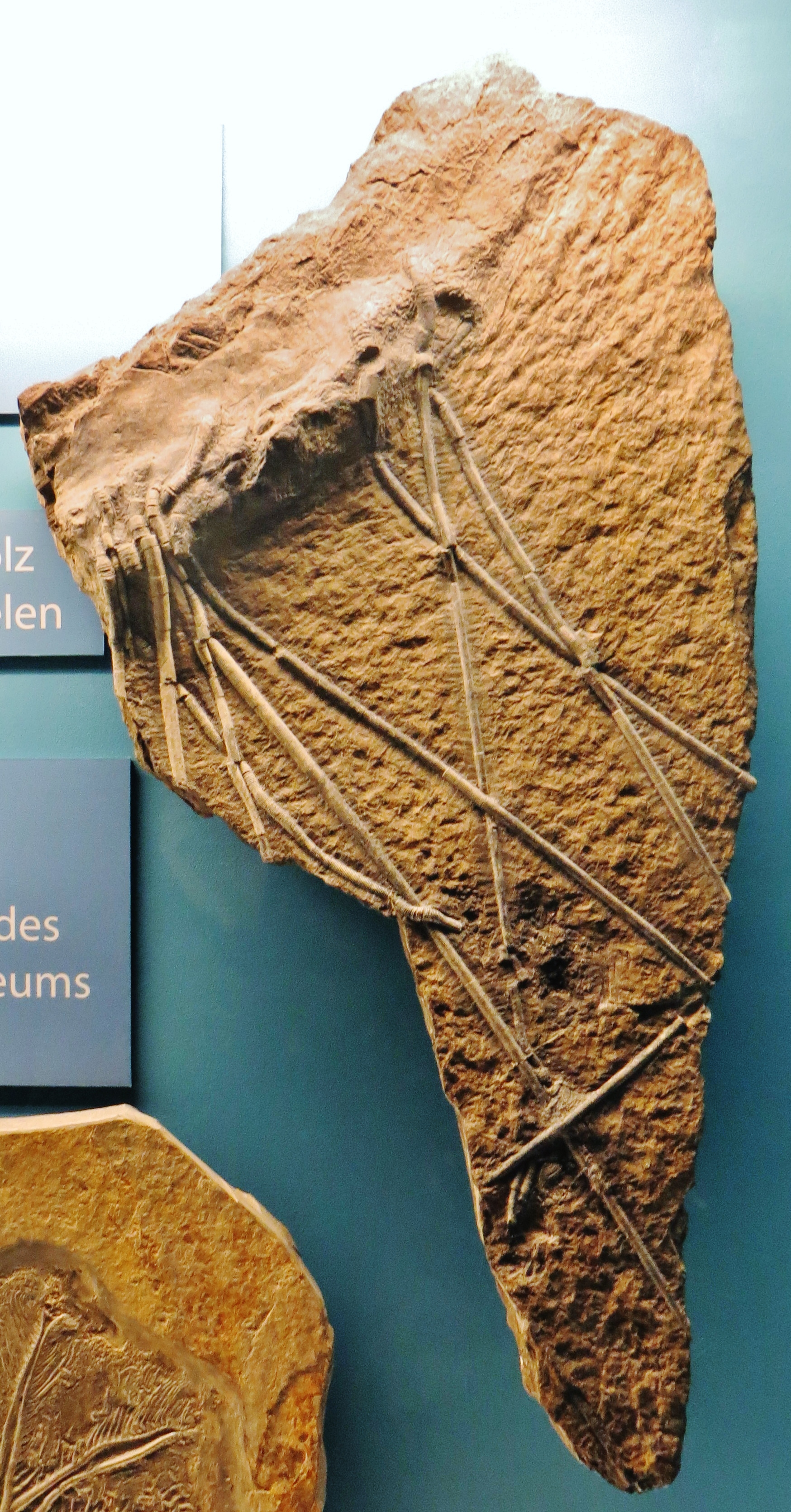 Fossil of Traumatocrinus - Took the picture at Natural History Museum, Basel